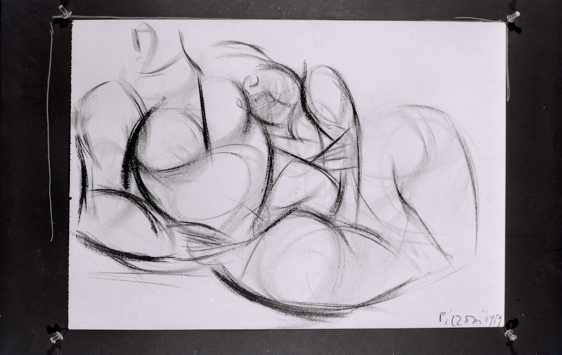 Servizio fotografico : Milano, 1967 / Paolo Monti. - Buste: 14, Fototipi: 15 : Negativo b/n, gelatina bromuro d'argento/ pellicola ; 6x9. - ((Serie costituita da 15 negativi identificati con i nn.: 23559-23573. Numerazione parallela: 146-159. Sulla busta R23559 manoscritto: "Pizzoni". La suddetta serie è contenuta nella scatola identificata con la numerazione R23214/23808. Sulla scatola manoscritto a pennarello: "Design e Arte moderna". - Fonte: Quaderno di Paolo Monti: s.t. [Soggetti e committenti] (1956-1961), presso Archivio Paolo Monti